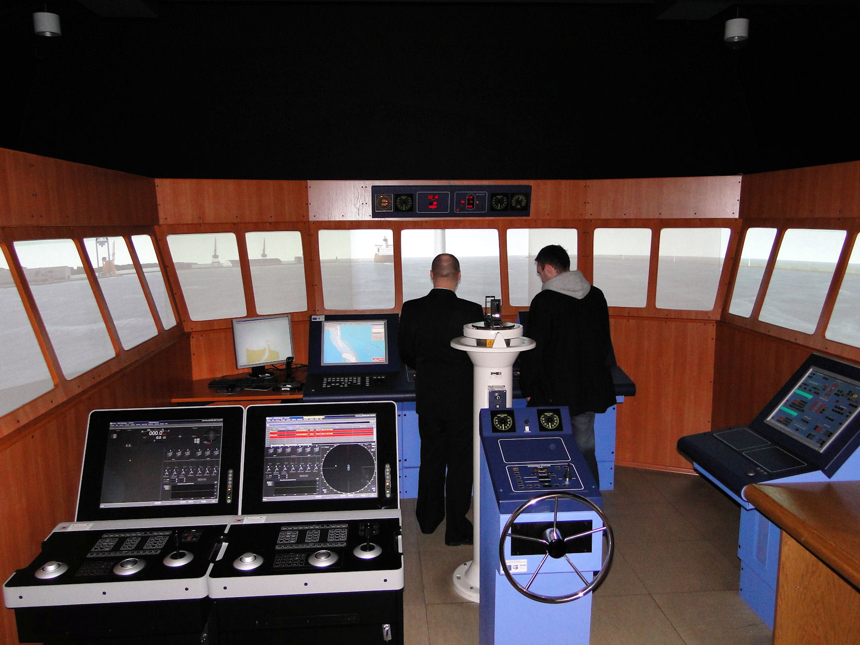 Symulator mostka kapitańskiego na Akademii Morskiej w Szczecinie